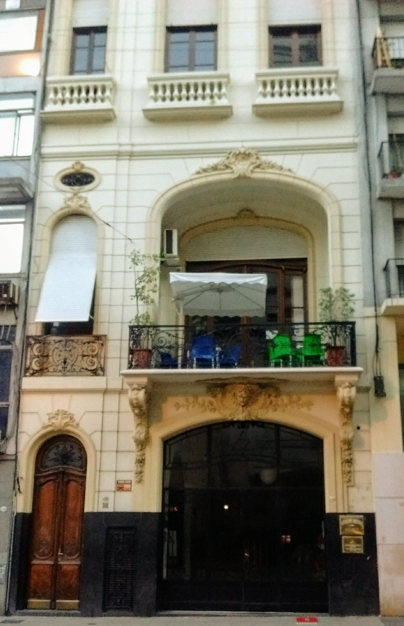 Palacio Dassen, actual Asociación Argentina de Actores, Adolfo Alsina n°s 1762/1764/1766, Buenos Aires, Argentina.